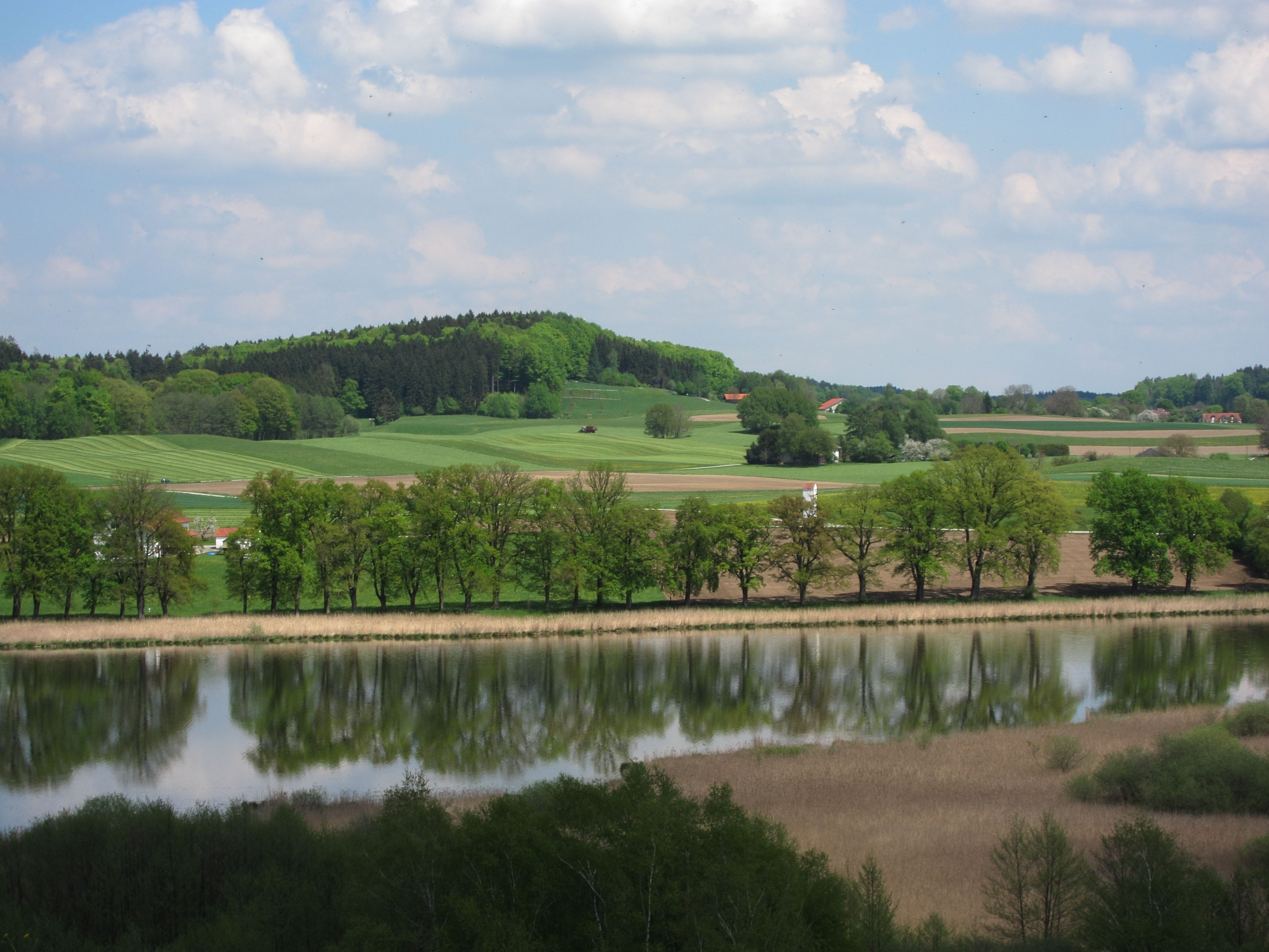 Egglsee, Eichenalleen und Zeilen von Eichenbäumen am Weg zum Ziegelhof, angelegt im 18. Jahrhundert durch das Kloster Ebersberg; Blick von der Kirche St. Michael in Hintereggelburg über den Egglsee auf die Allee.